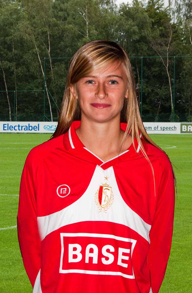 Julie Biesmans, photo individuelle